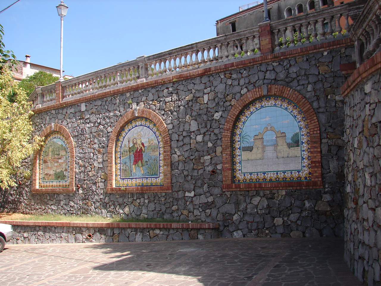 Piazza di San Cristoforo con la raffigurazione dei 3 paesi del comune